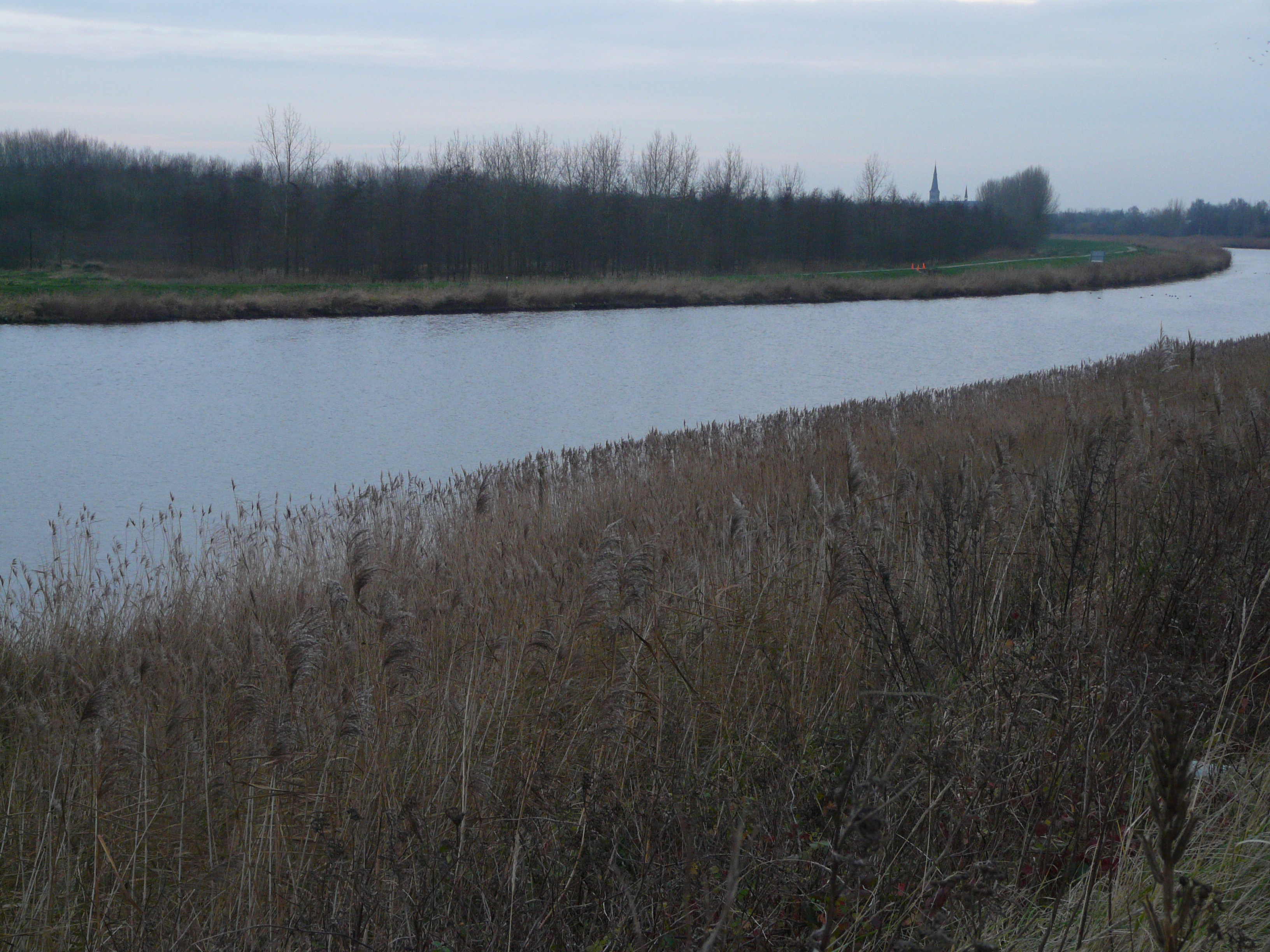 Zicht op een deel van het Haagse Beemdenbos en rivier de Mark (Dintel). Gelegen nabij Terheijden